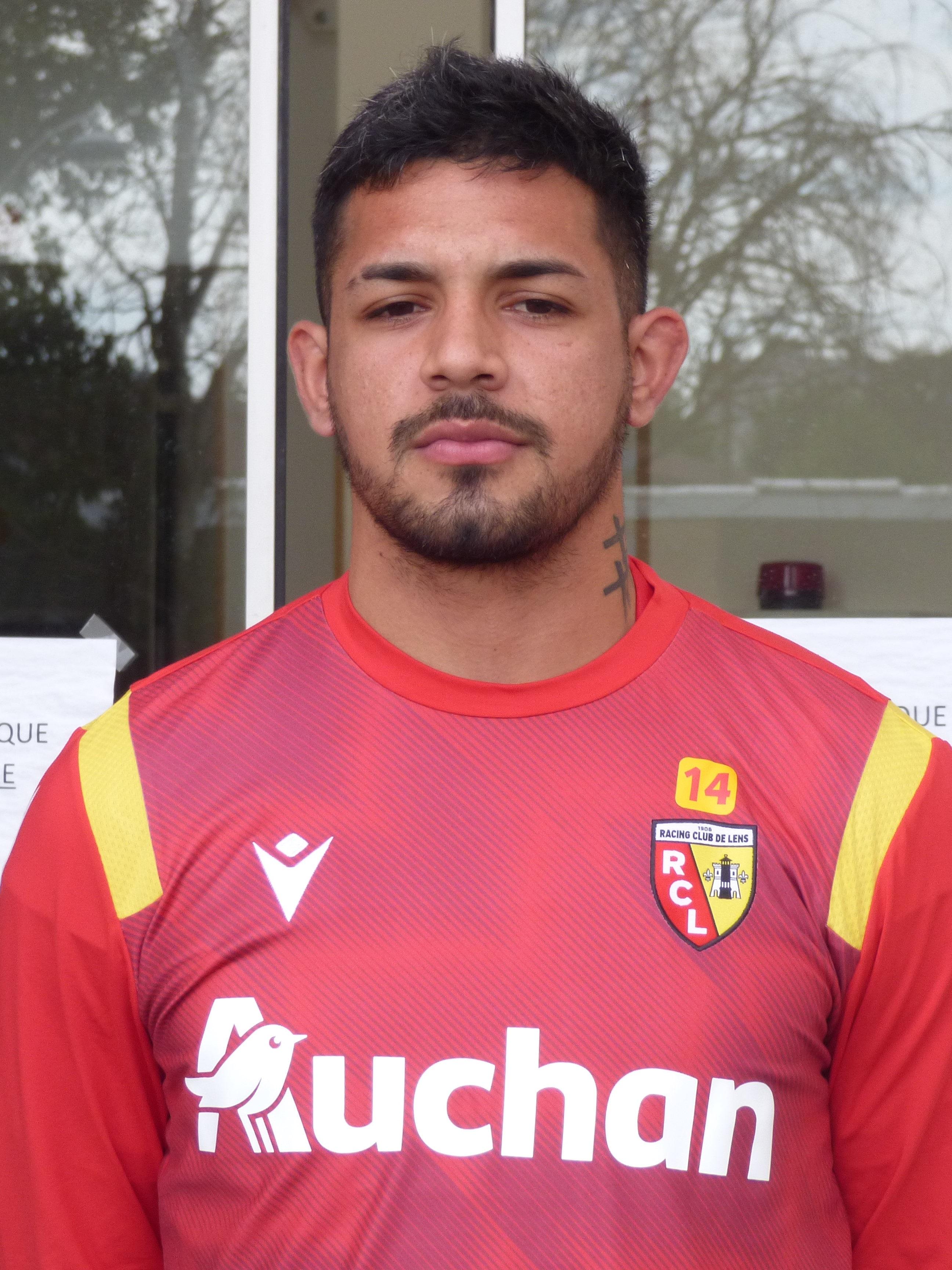 Facundo Medina lors d'un entraînement du Racing Club de Lens, le 15 juillet 2020, au centre technique et sportif de La Gaillette